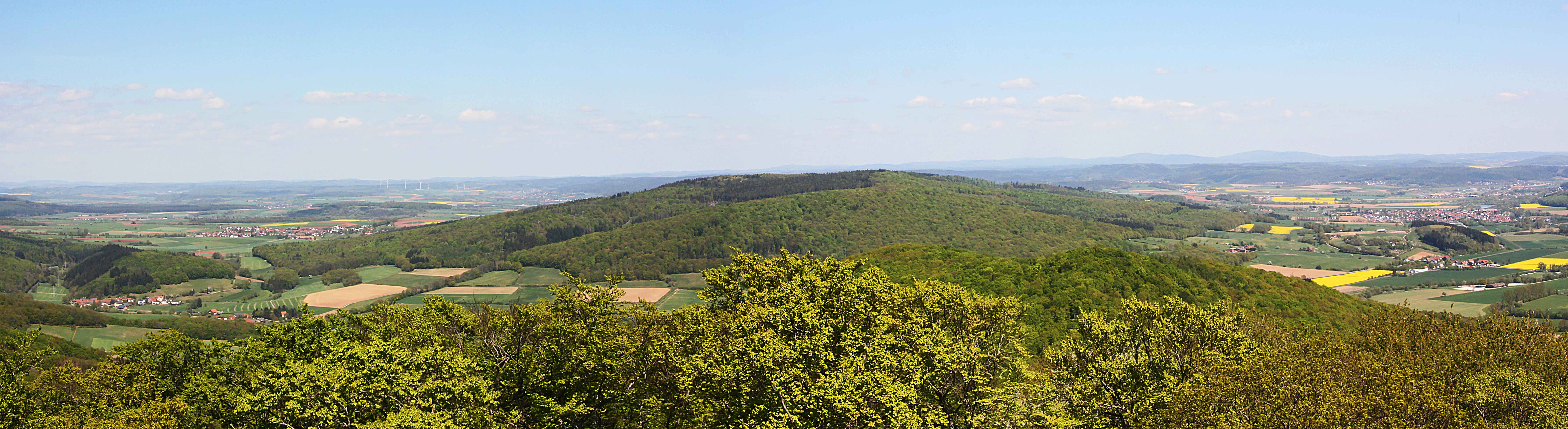 Panoramablick vom Rimbergturm (497 m + 24 m Turmhöhe) in nordöstliche Richtung zum Wollenberg (474 m), die Orte Brungershausen und Sterzhausen im Lahntal, sowie Warzenbach bei Wetter.